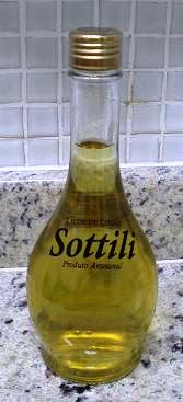 Licor Tipo Limoncello, utilizando cachaça no lugar de álcool